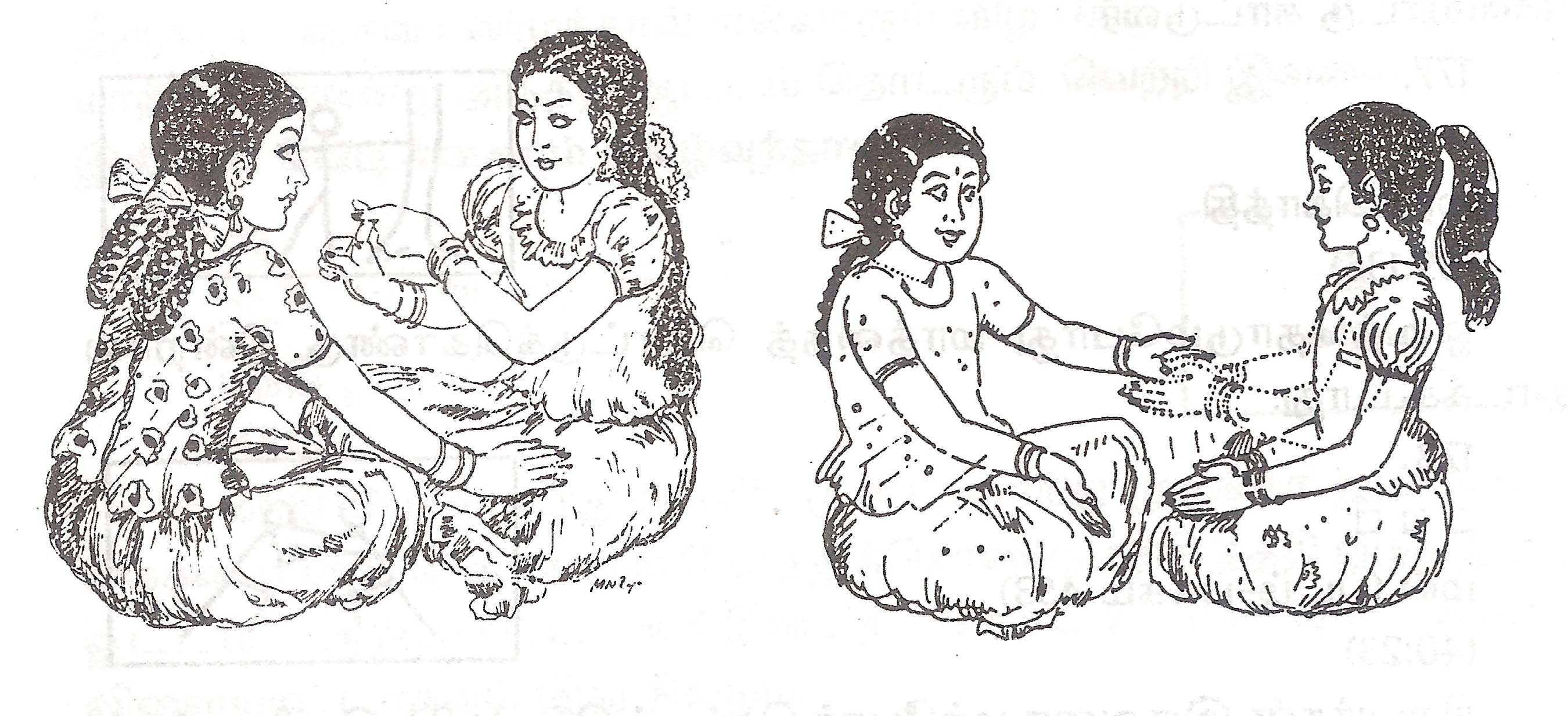 Game “Aindtu-Pandtu” ஐந்து-பந்து or “Anju-Pandhu” அஞ்சுபந்து is a game of Tamil-Nadu, India in rural areas. The image was taken from my own source, a book written by me, Vanishing-Game , Maraikindra Vilaiyaattugal. மறைகின்ற விளையாடுகள், 2002